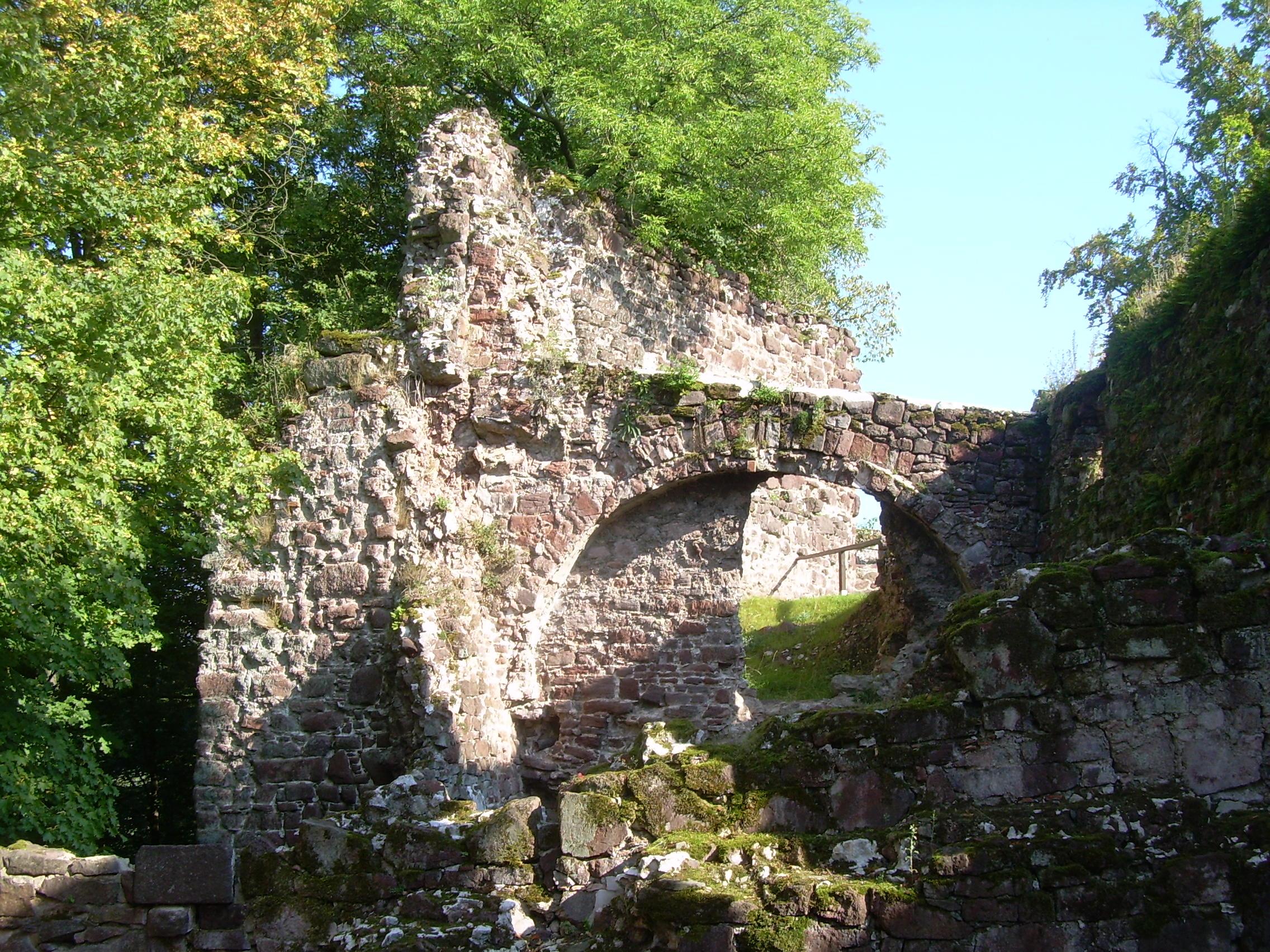 Mauerwerksbogen der Burg Hohnstein im Harz